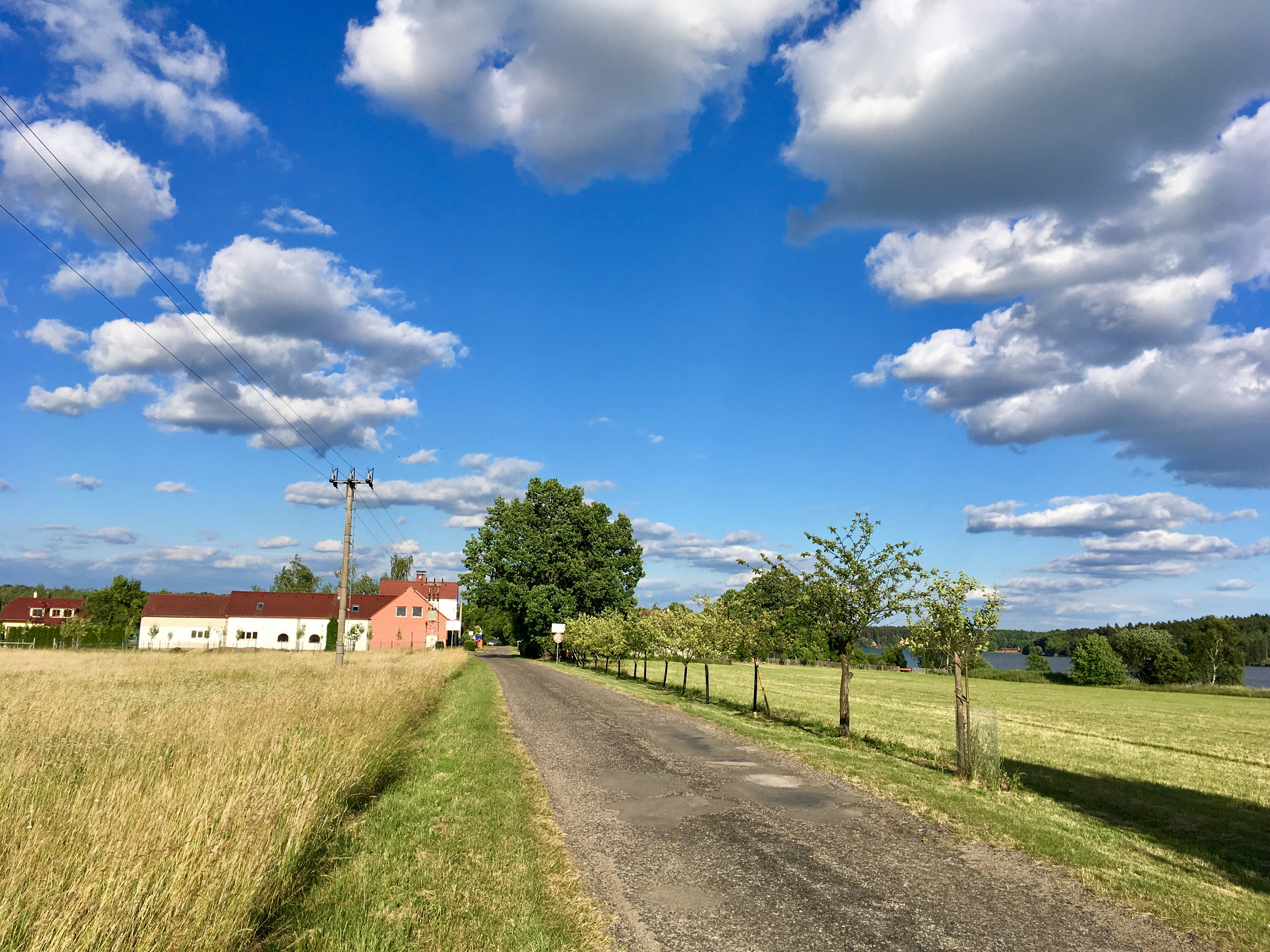 Zálužice